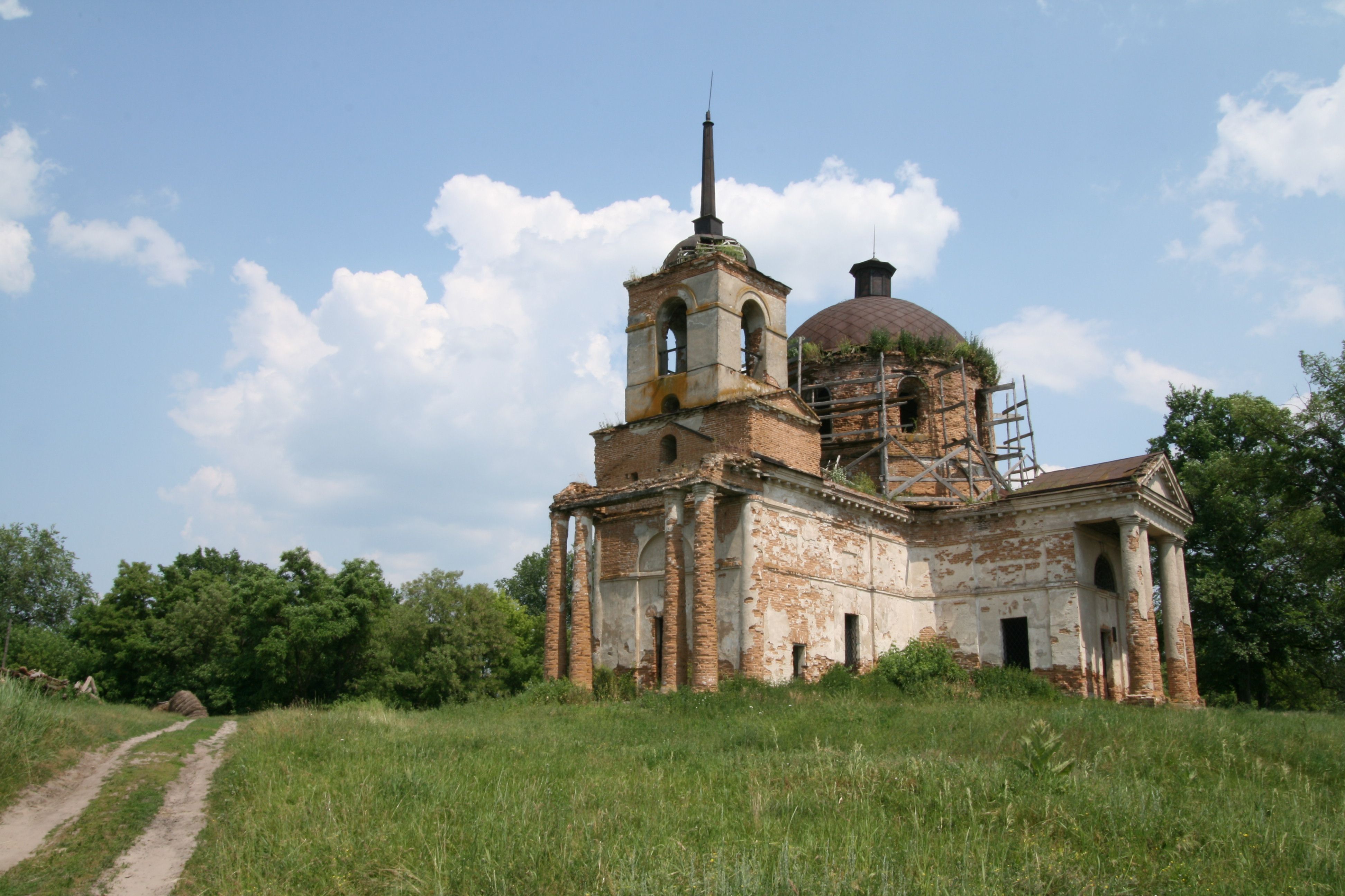 Миколаївська церква (мур.), с.Веприк